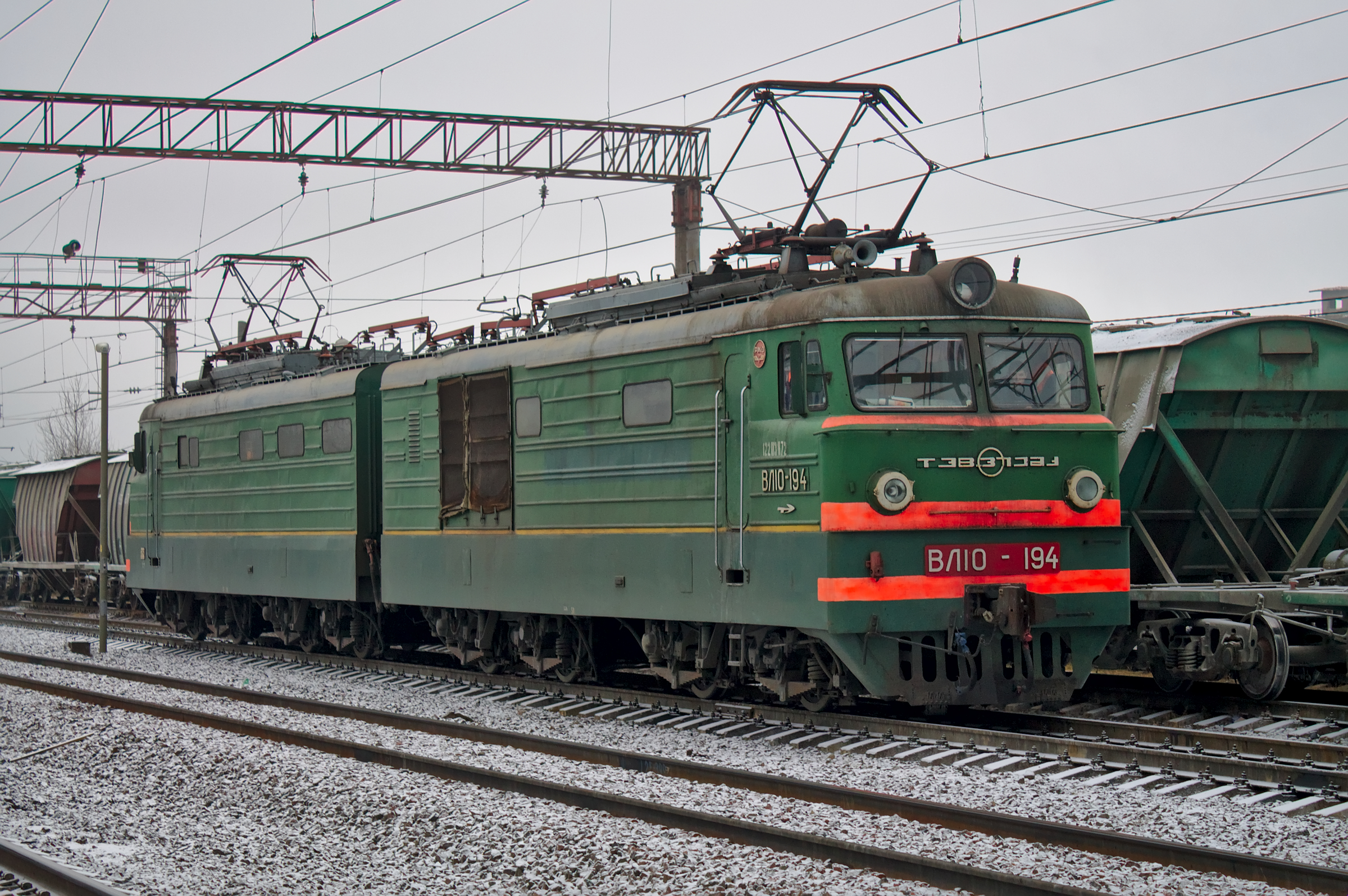 ВЛ10-194, станция Волховстрой-II. см. фото 638061 в альбоме автора